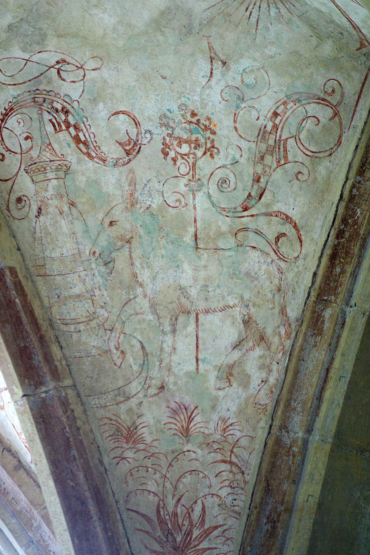 Kloster Maulbronn Darstellung der Gründungslegende im Brunnenhaus